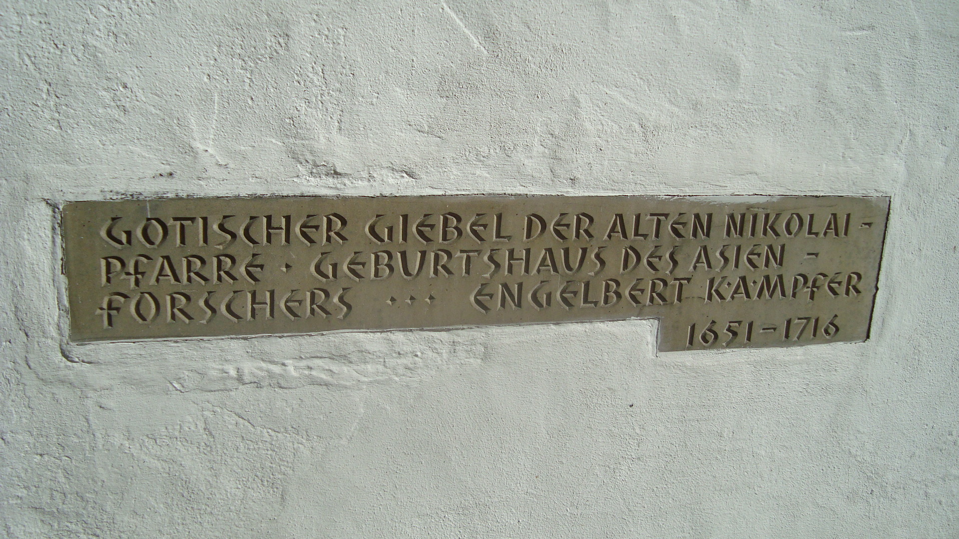 Gemeindehaus der Kirche St. Nicolai mit einer Plakette über den Geburtsort von Engelbert Kaempfer